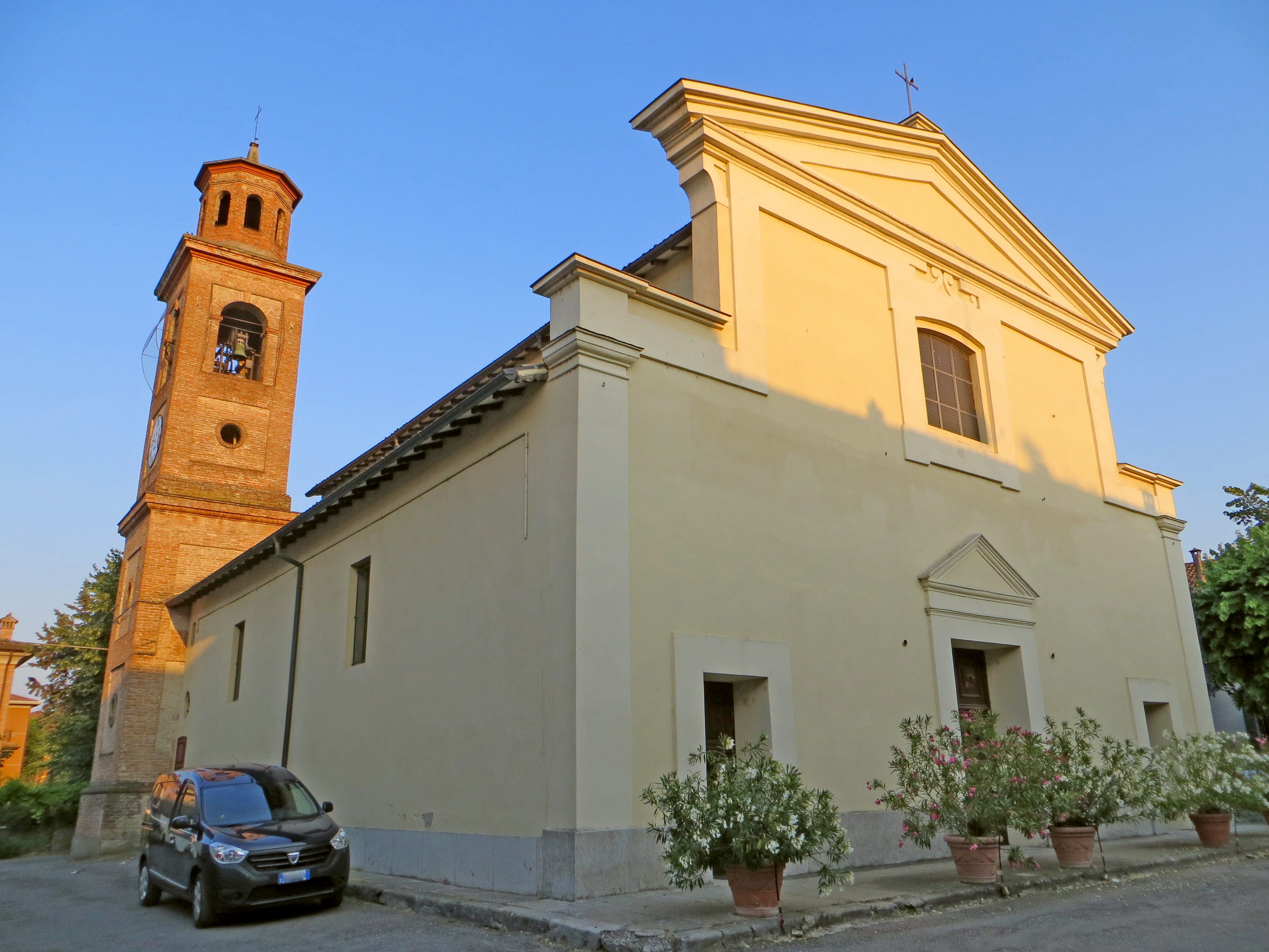 Pieve di San Pancrazio Martire (San Pancrazio Parmense) - angolo nord-ovest